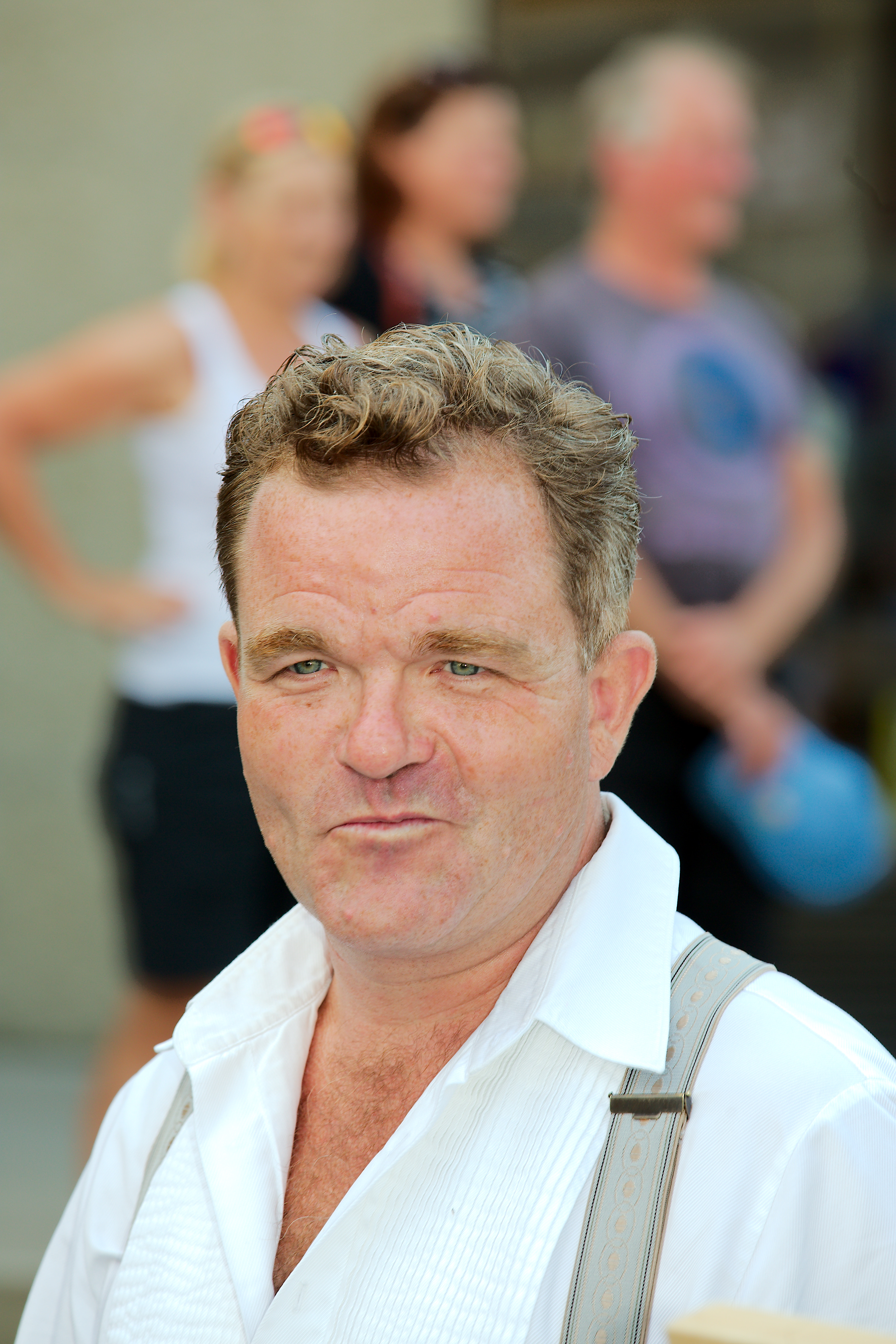 Zug des Jedermann Ensembles vom Festspielhaus zum Domplatz